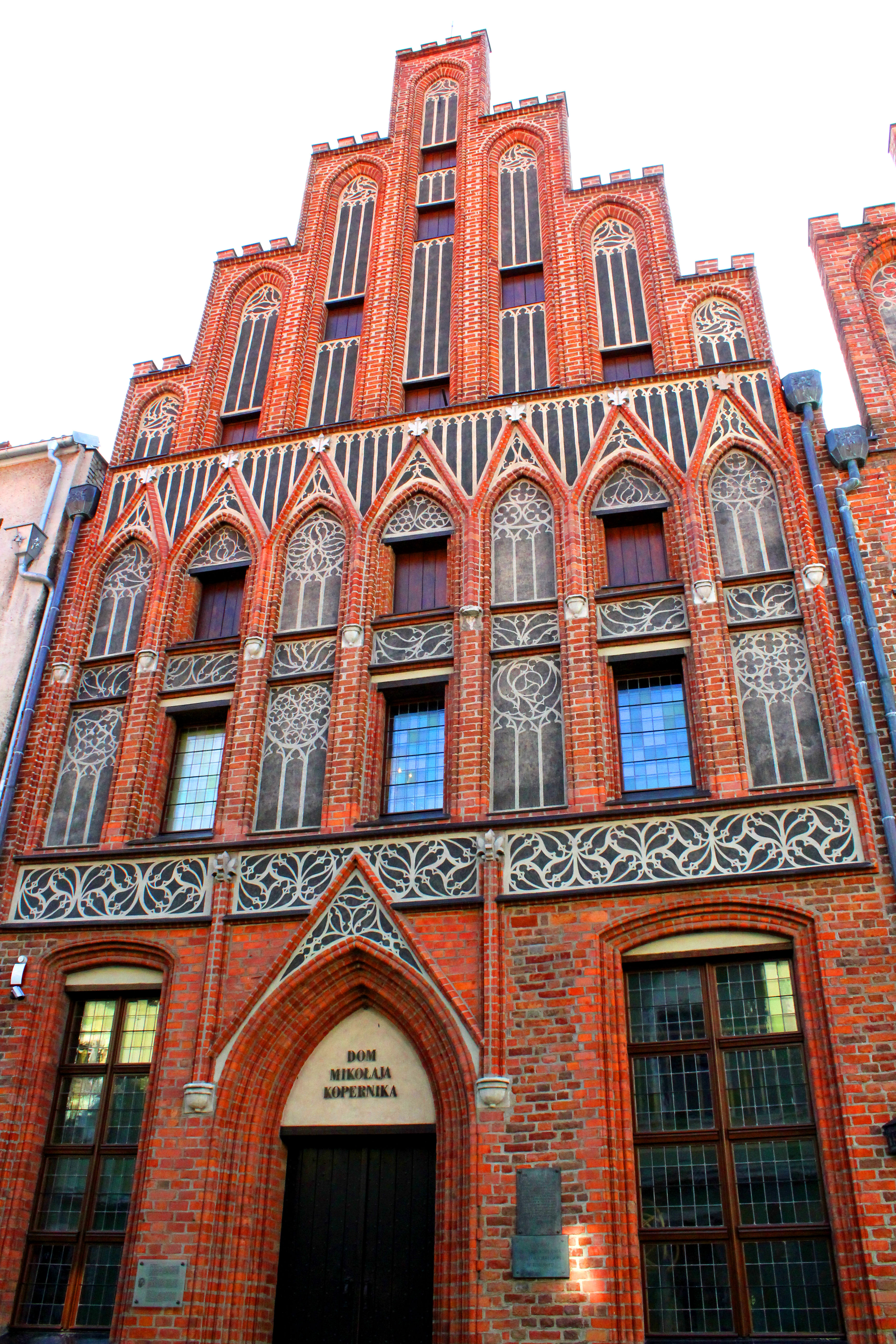 Toruń, ul. Kopernika 15 (dawniej 13) - gotycka kamienica z oficynami, ok. 1350, obecnie część oddziału Muzeum Okręgowego - Dom Mikołaja Kopernika (zabytek nr A/961)